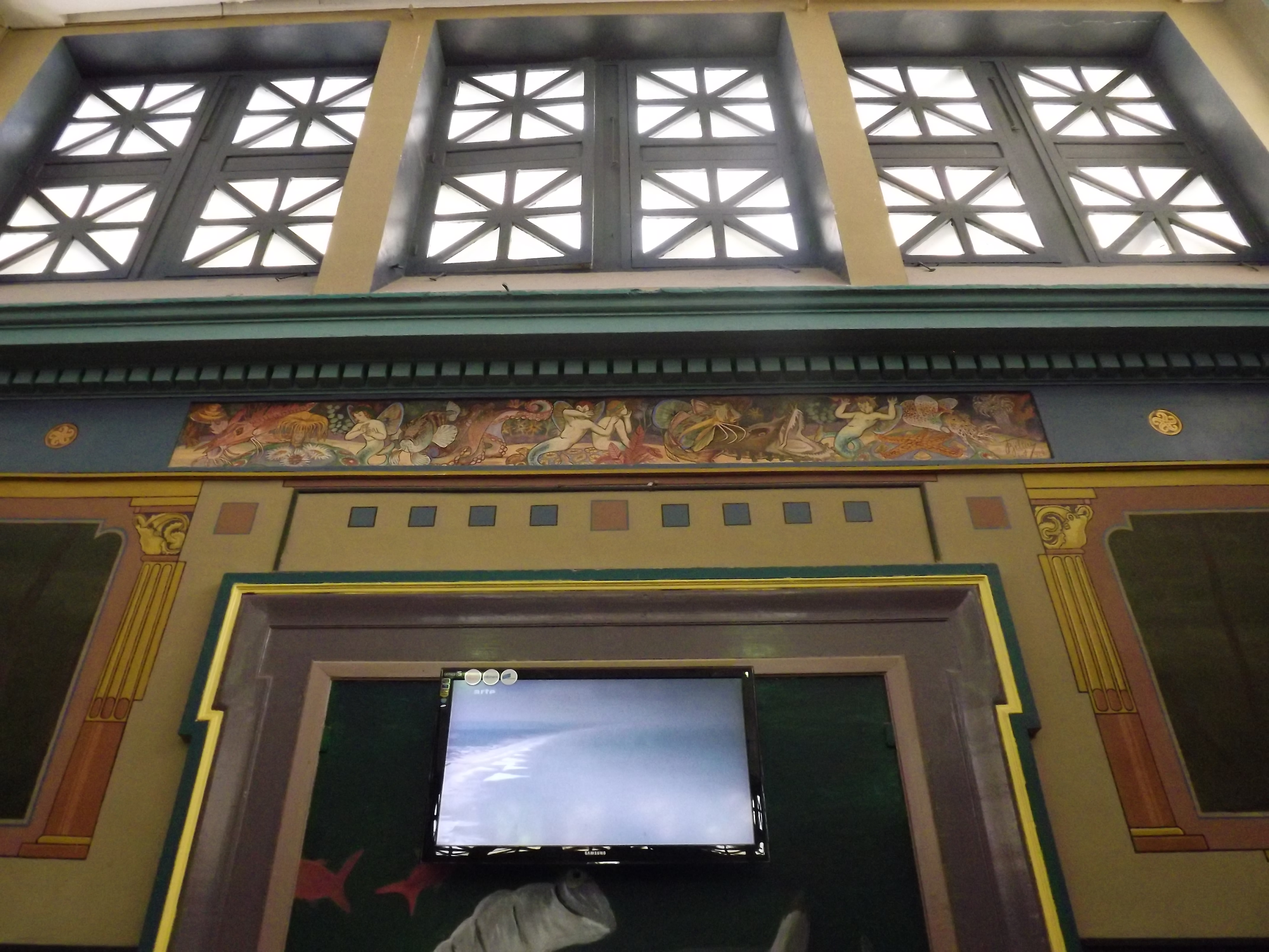 Détail du système de claustras et de la fresque de l'atrium